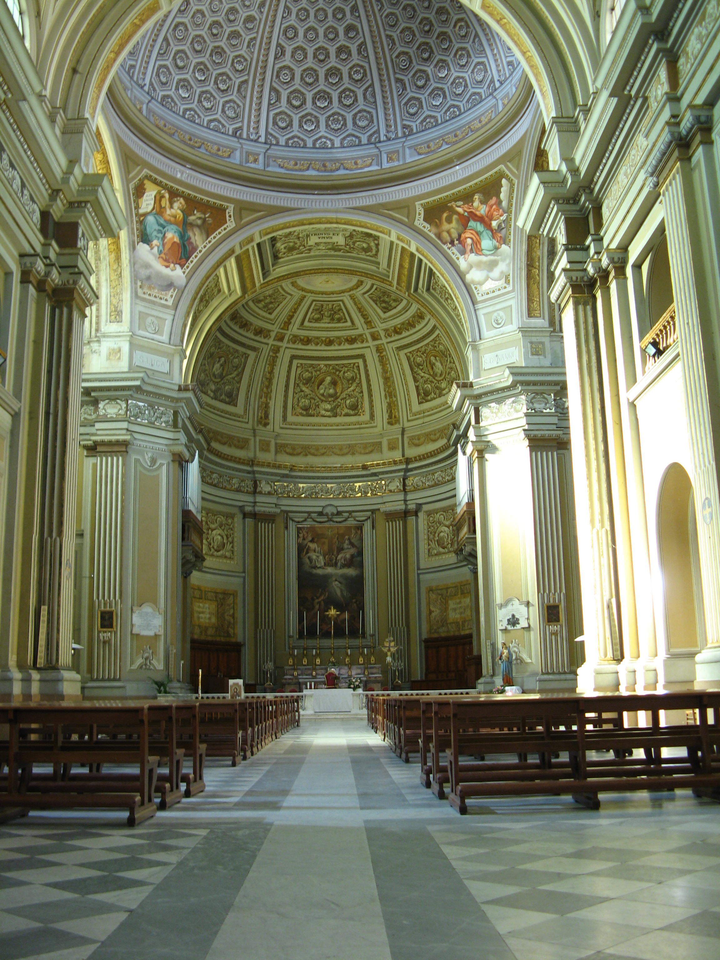 Genzano di Roma, Collegiata della Santissima Trinità (ovvero Chiesa di San Tommaso di Villanova), Interno: Grande navata centrale